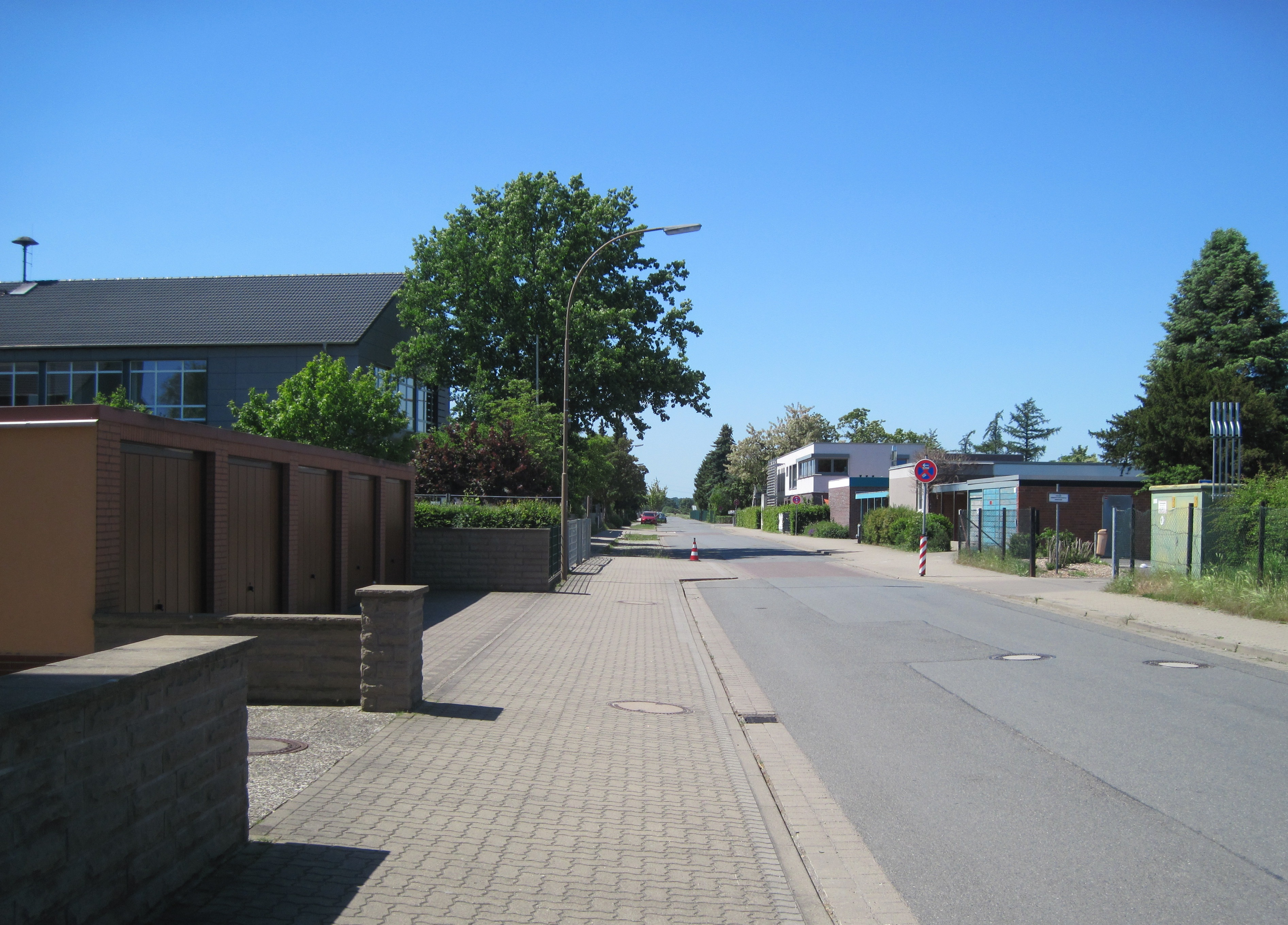 Partie Vöhrum-Hainwaldweg: Links Grundschule + Mensa; Rechts Dorfgemeinschaftshaus + Kita; Im Hintergrund rechts der Kleingartenverein "Erholung"